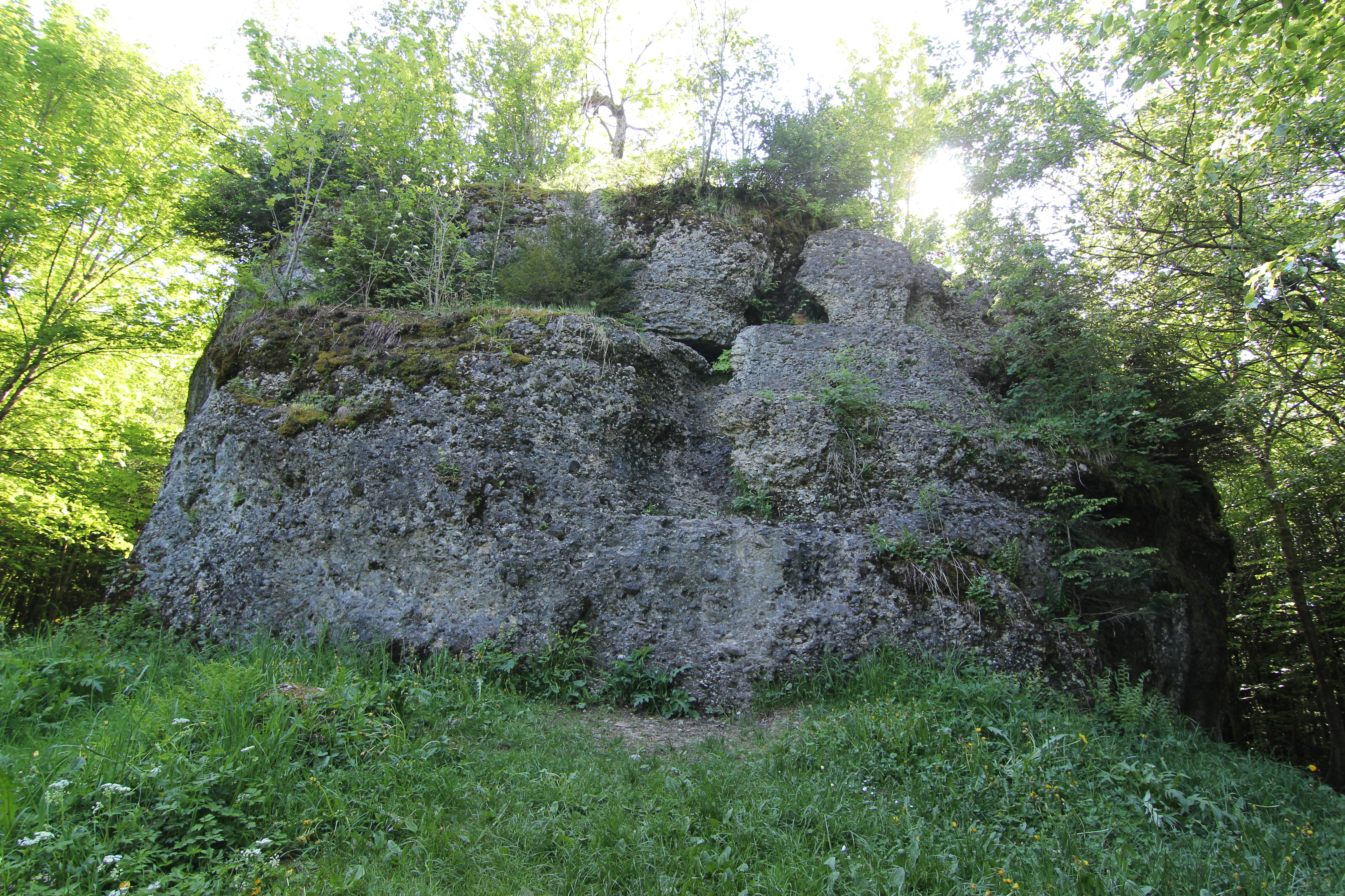 Geotop Dengelstein